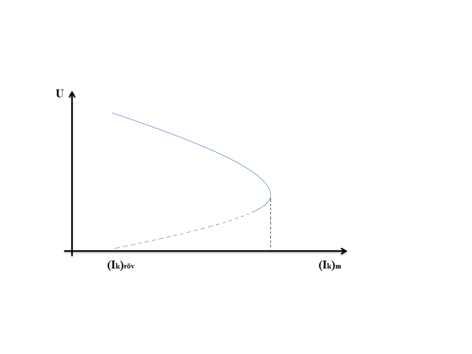 Párhuzamos gerjesztésű generátor külső, terhelési karakterisztikája